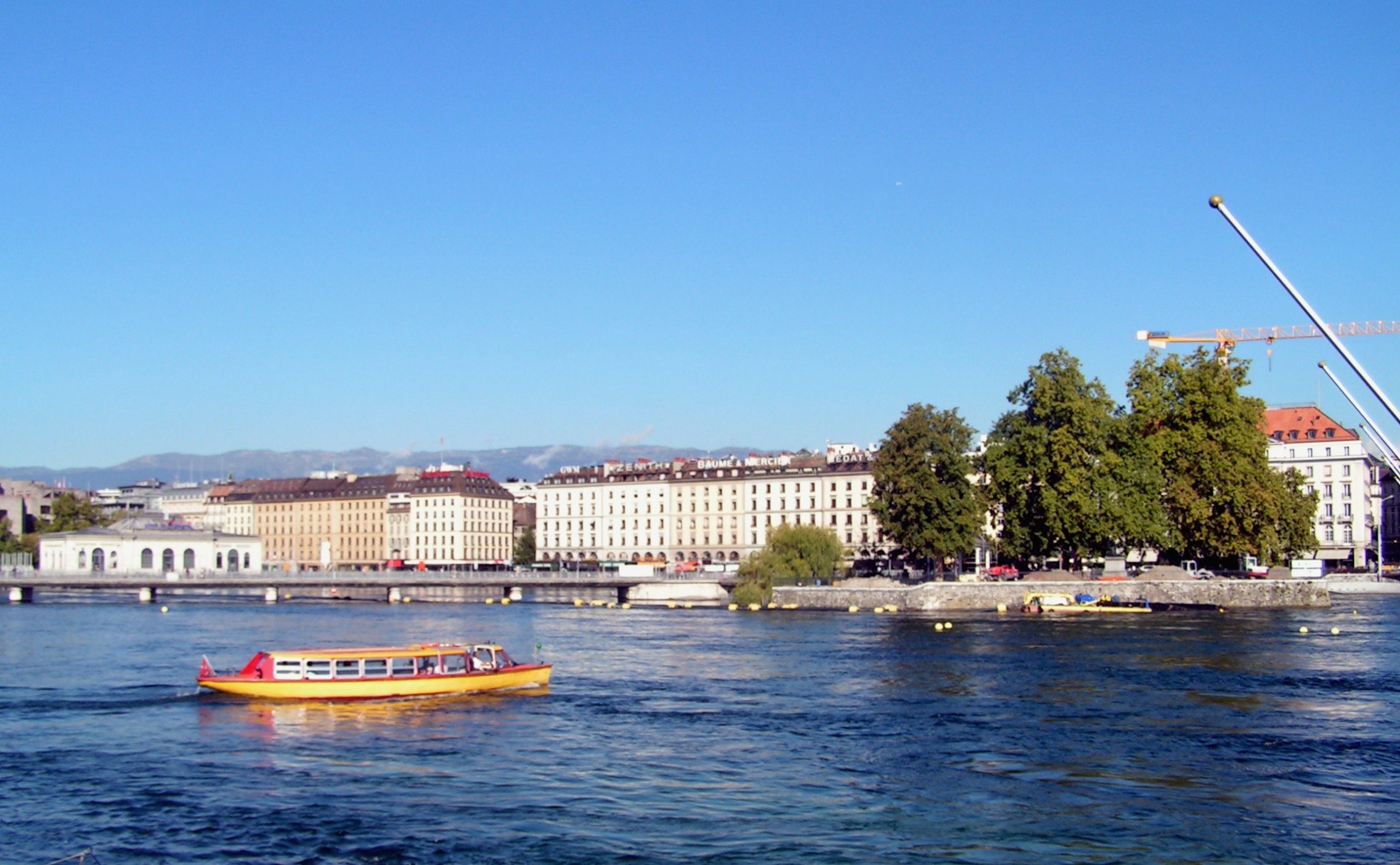 Île Jean-Jacques-Rousseau et quai des Bergues, Genève. Depuis la promenade du lac.